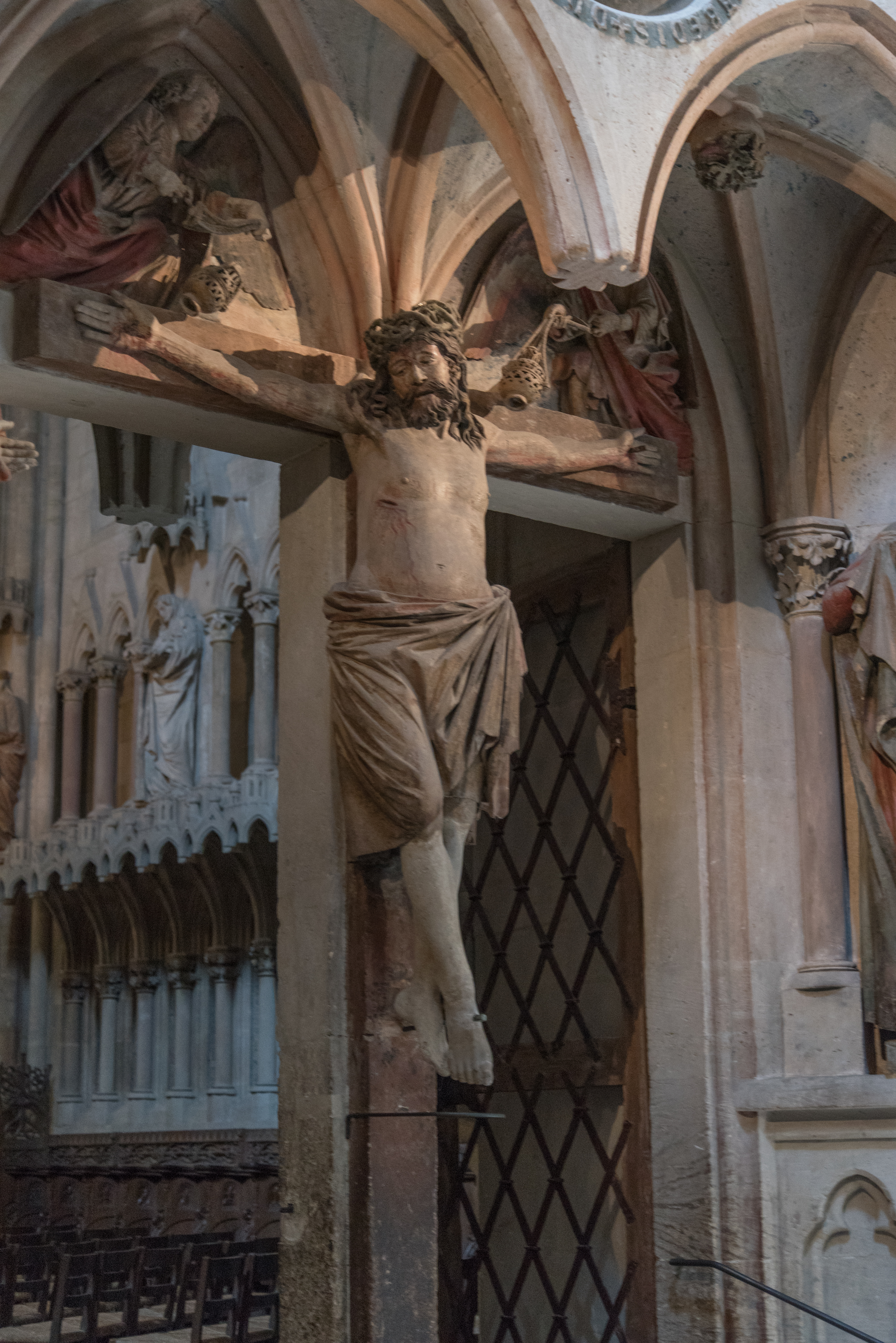 Naumburg an der Saale, Dom, Westlettner